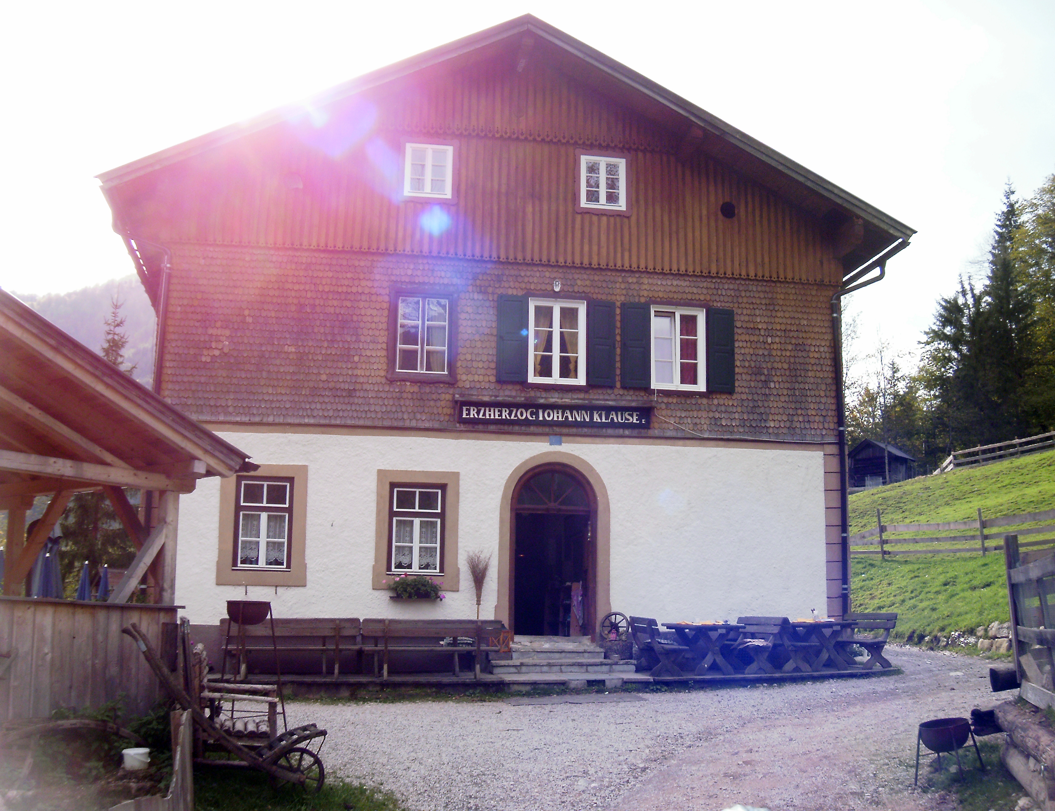 Gasthof Erzherzog-Johann-Klause